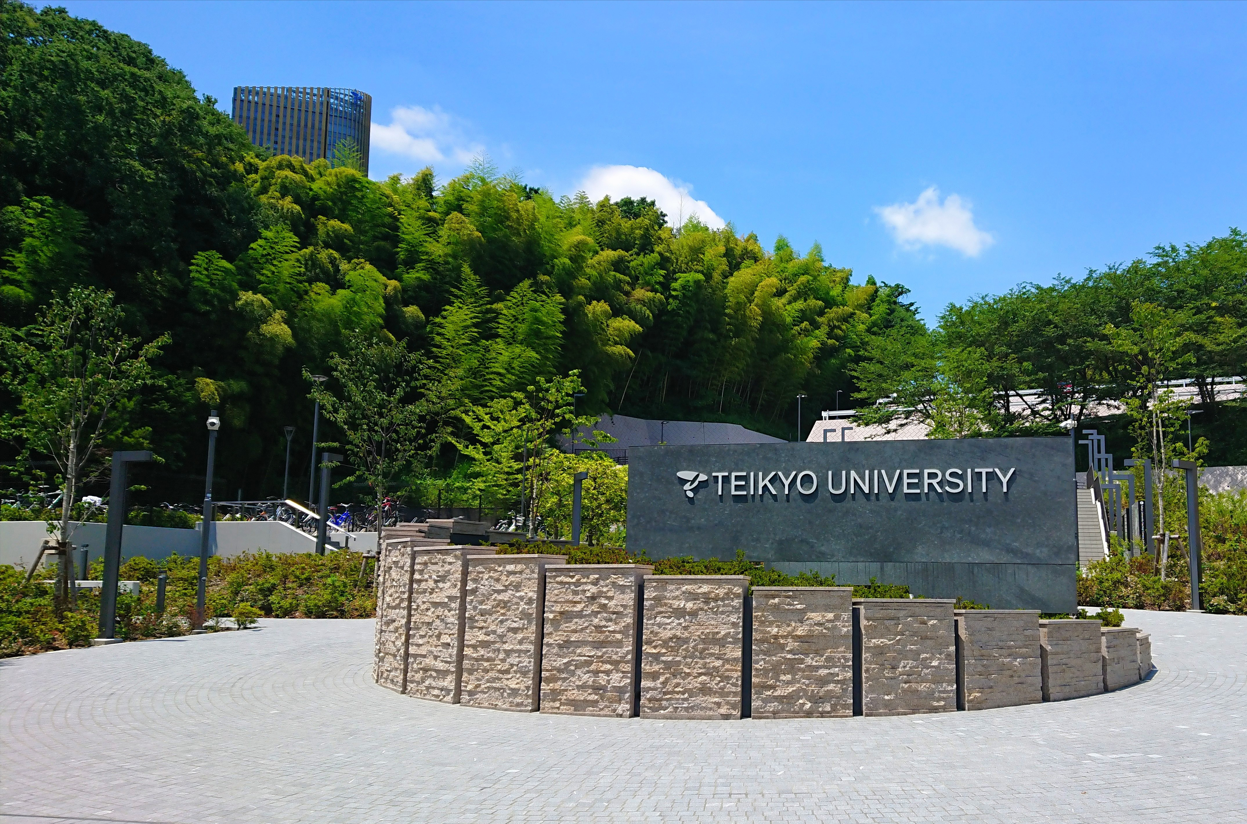 帝京大学八王子キャンパス正門